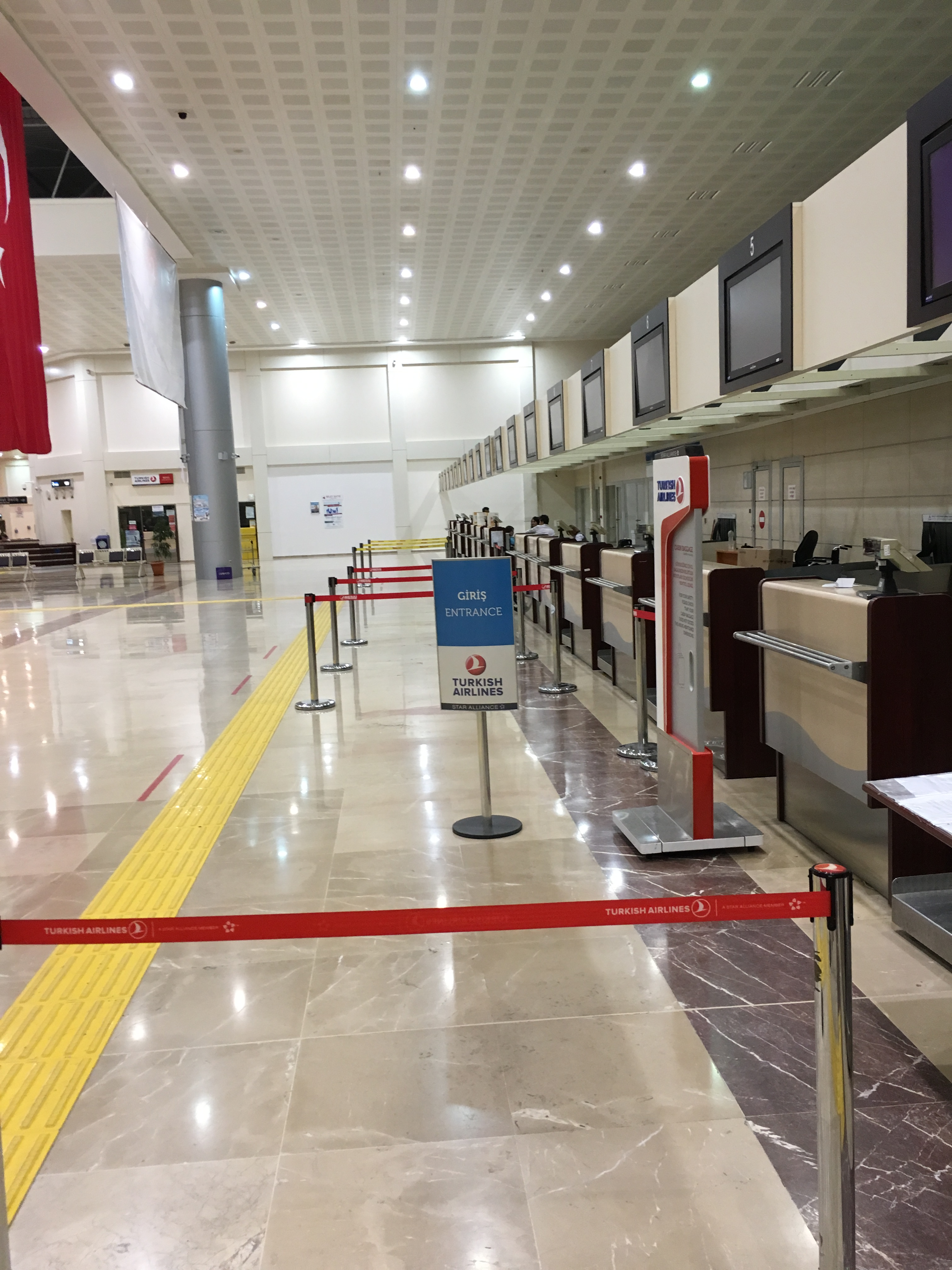 Guichet d'embarquement de l'Aéroport Denizli-Çardak